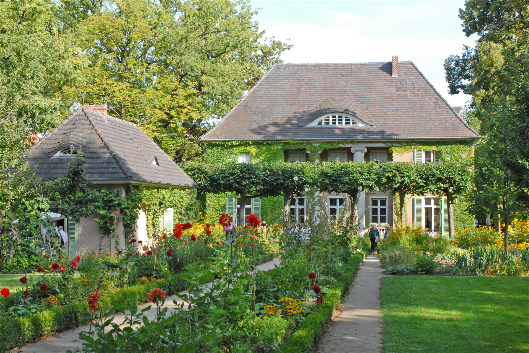 La villa coté jardin En 1909, Max Liebermann fait construire une maison d'été au bord du lac "Wannsee". Après avoir passé tous ses étés en Hollande où il peint de très nombreuses oeuvres, Wannsee devient pour lui un refuge loin de Berlin et de son agitation. Plus de 200 toiles ont été créées dans le parc de sa villa. En 1940, à cause des origines juives de la famille, sa veuve est dépossédée par le régime national-socialiste de la villa qui, après la guerre, en 1951, est rendue à la fille de l'artiste. Elle est ensuite vendue à la ville de Berlin par les héritiers et ce n'est qu'en 1997 que la villa peut devenir un musée. Après une longue période de travaux pour restituer l'ensemble selon les plans d'origine, la villa et son parc sont ouverts au public en avril 2006 avec l'aide de nombreux donateurs et bénévoles. Site de la villa de Max Liebermann (Berlin) Article Wikipedia sur Max Liebermann